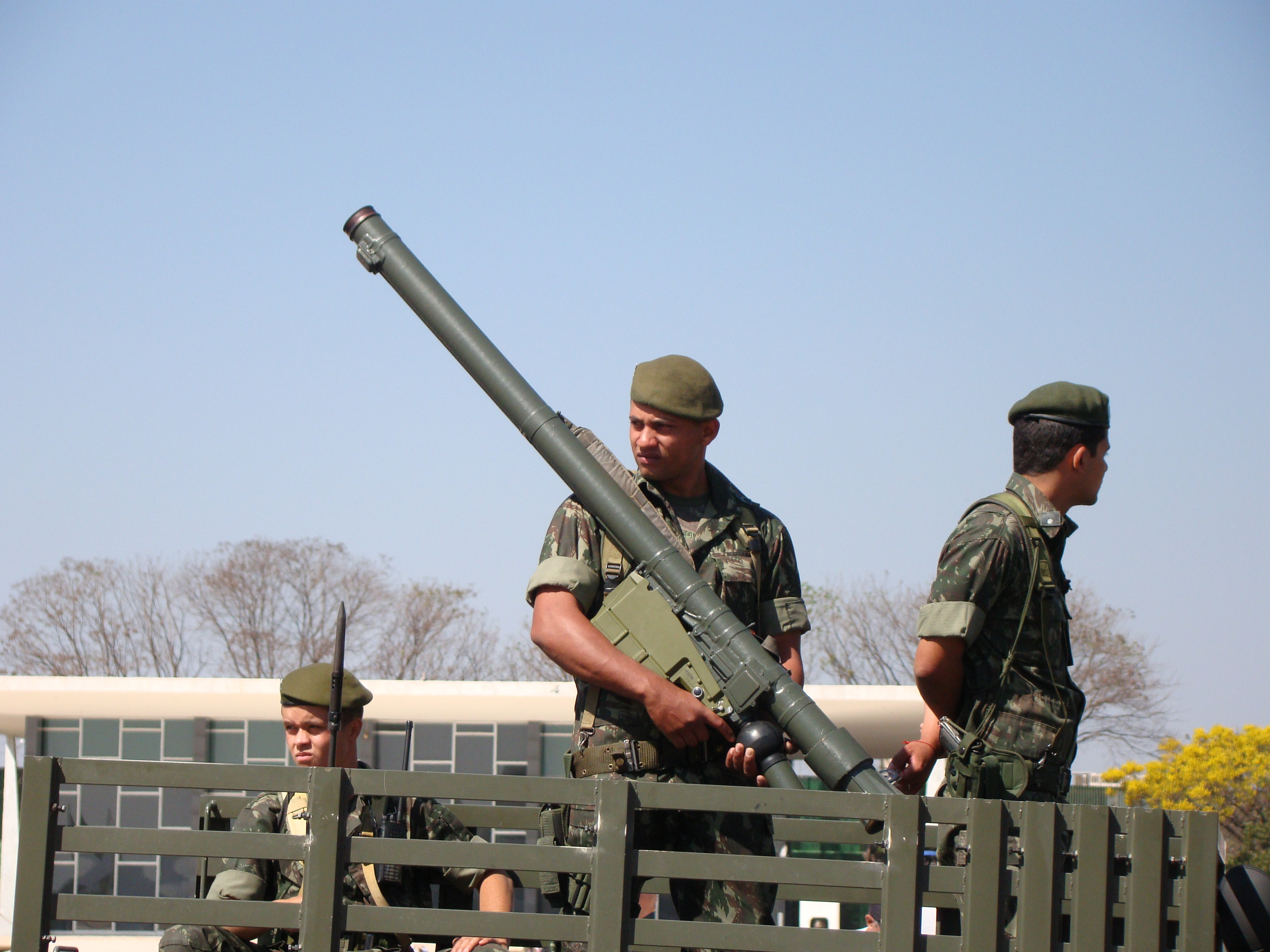 Surface to air missile IGLA Anti-aéreo